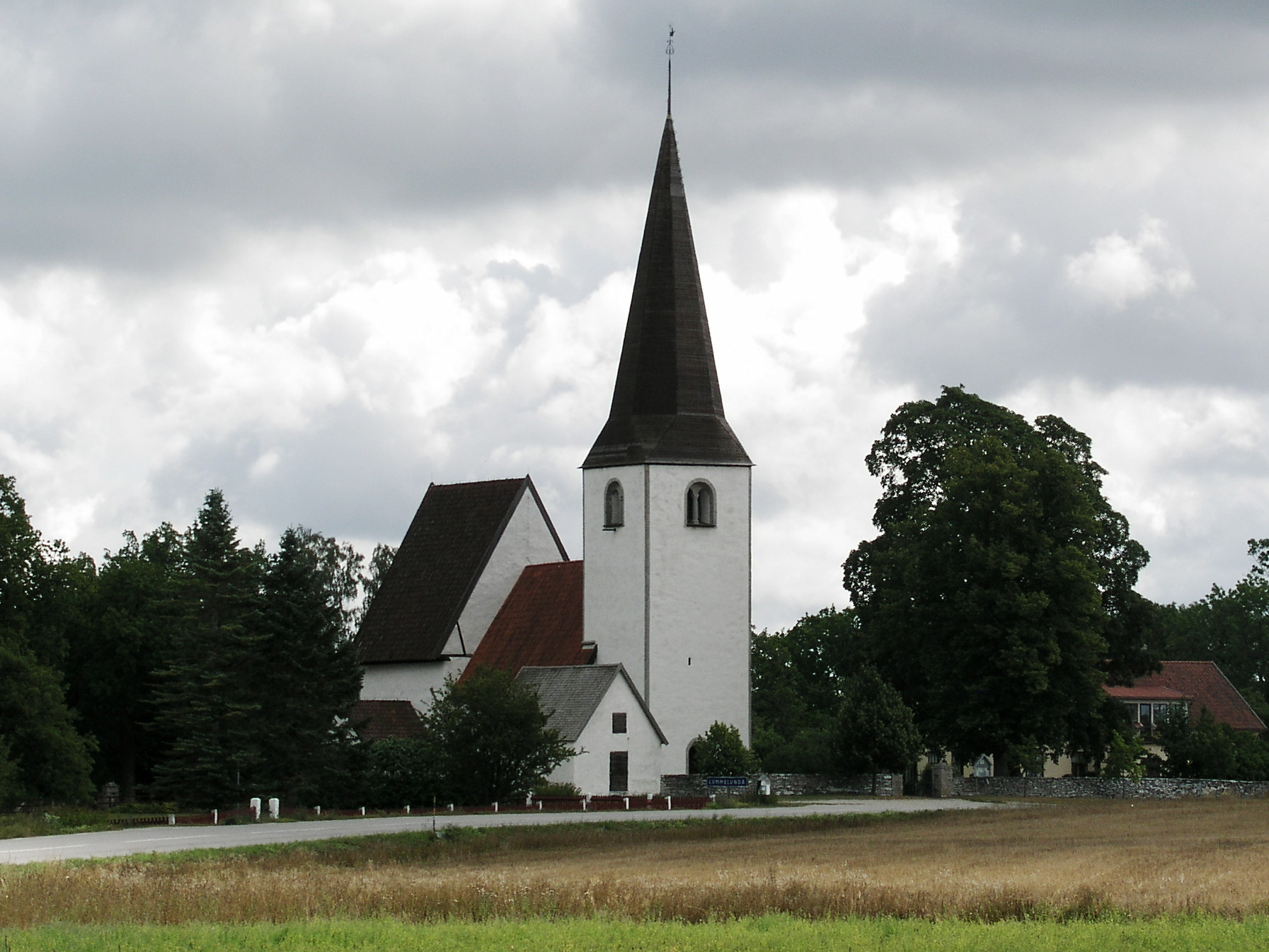 Lummelunda kyrka, Diocese of Visby, Gotland, Sweden. Distant view.